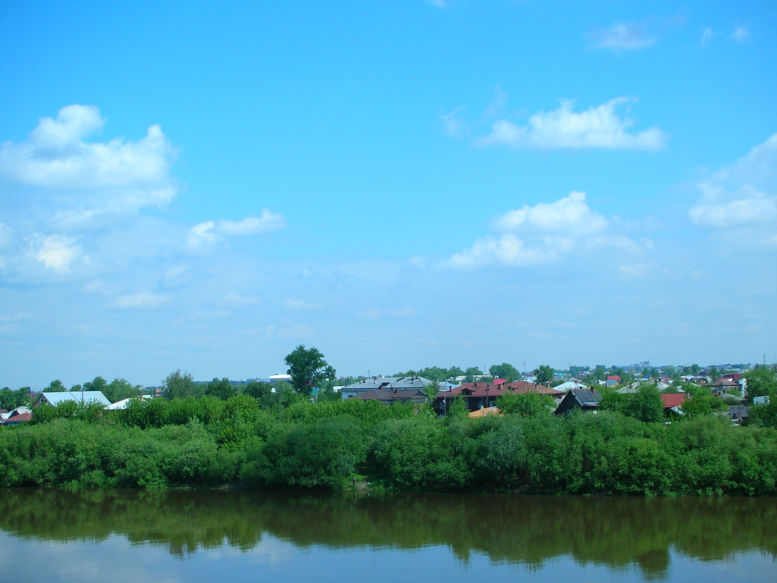 Бухарская слобода в Тюмени